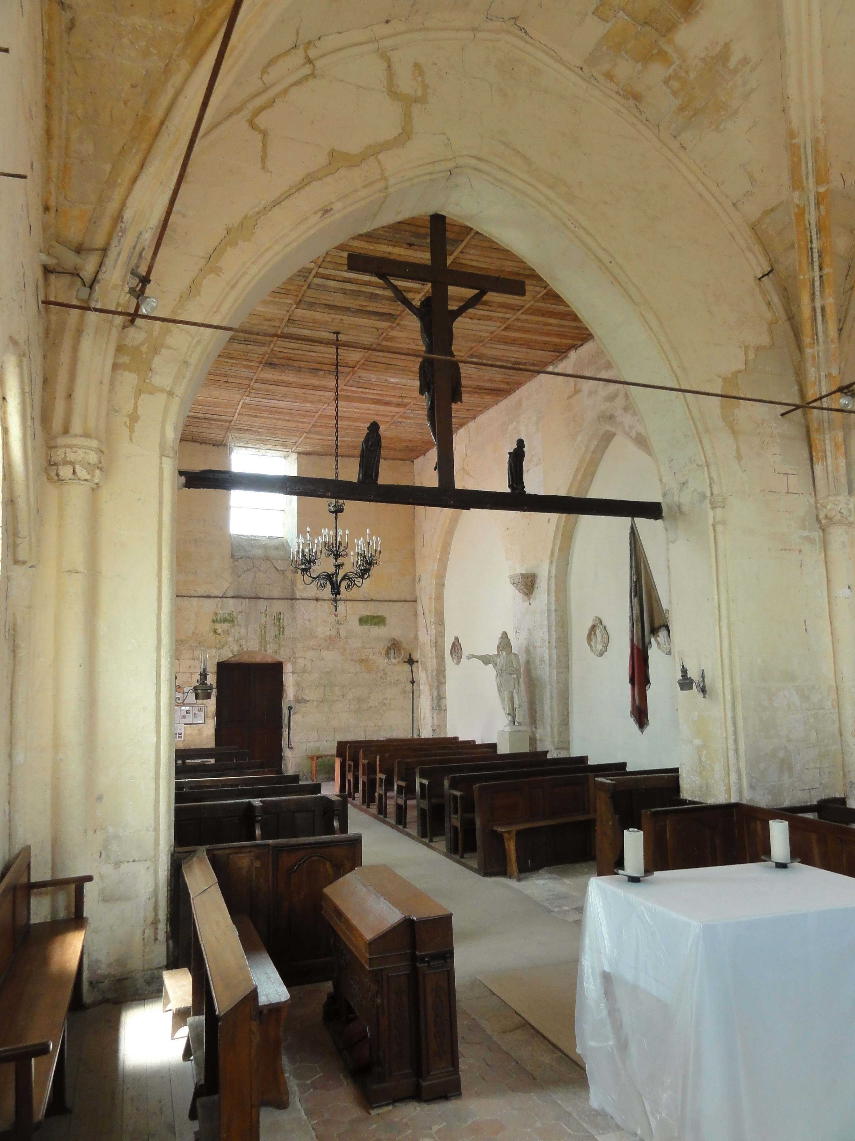 Intérieur de l'église (voir titre).